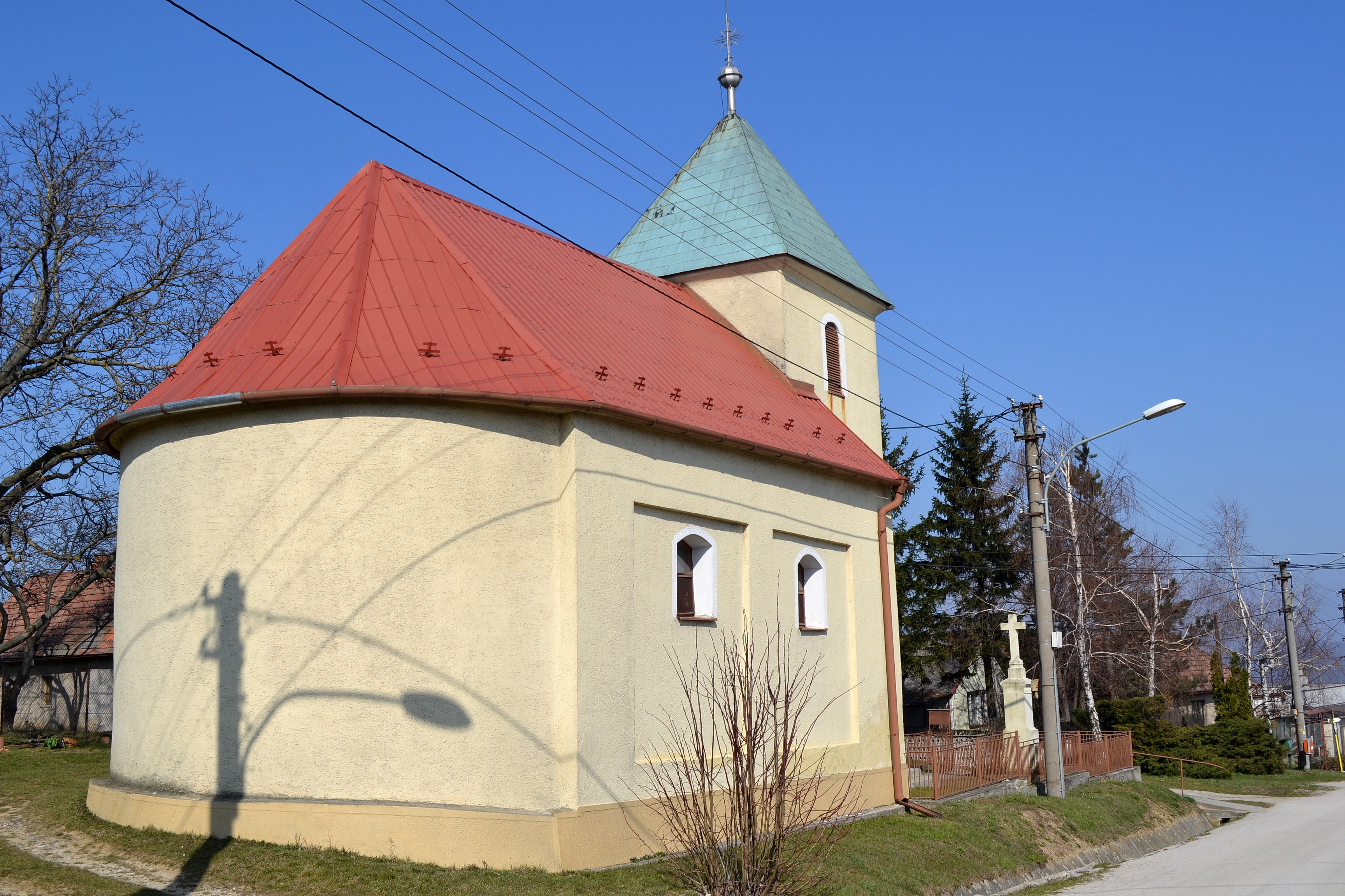 Kostol Nanebovzatia Panny Márie v miestnej časti Cerová-Rozbehy